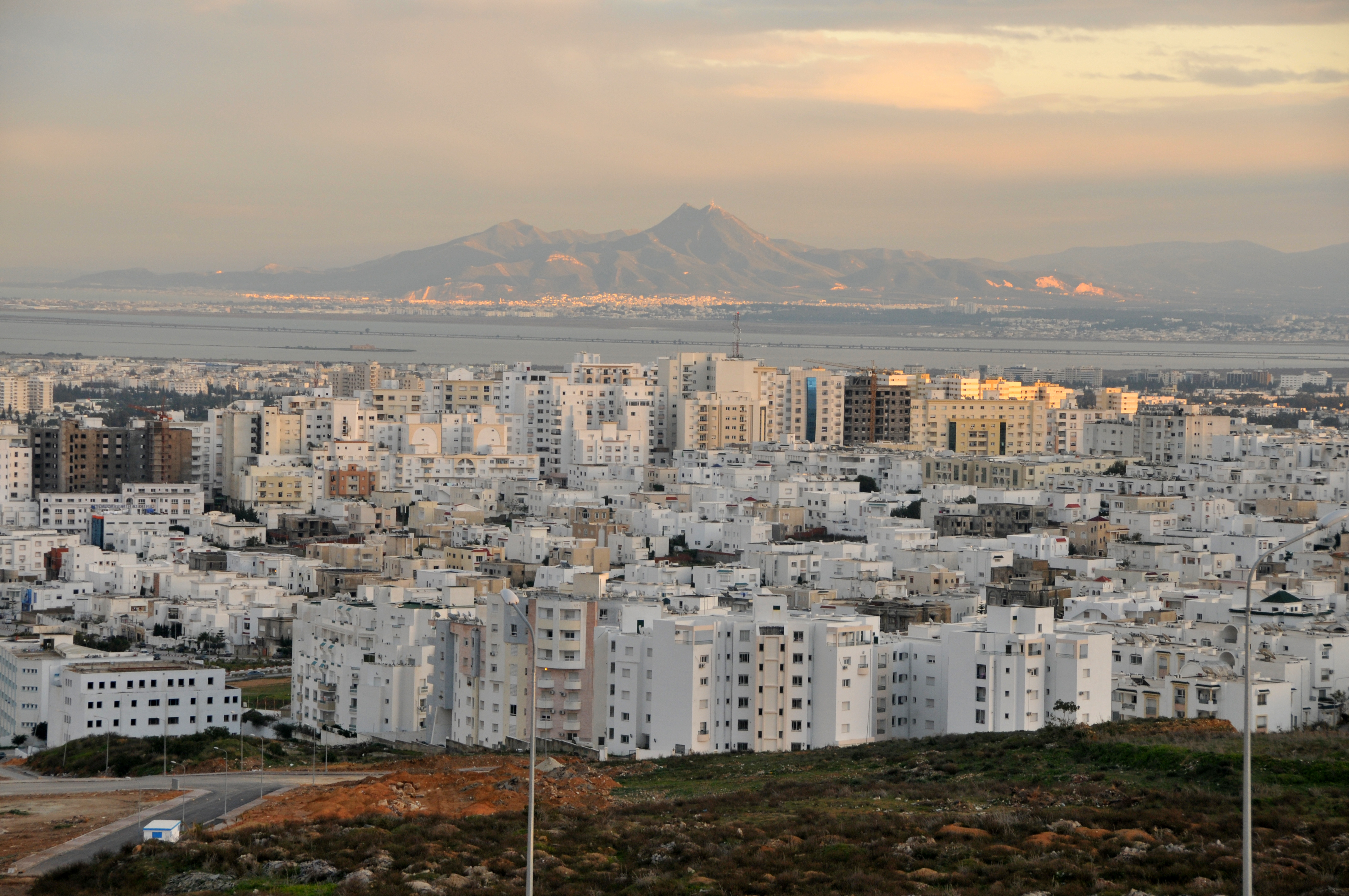 Panoramique de Tunis: Ennasr, El Menzah, Cherguia, Lac de Tunis, Hammam Lif et Djebel Boukornine.